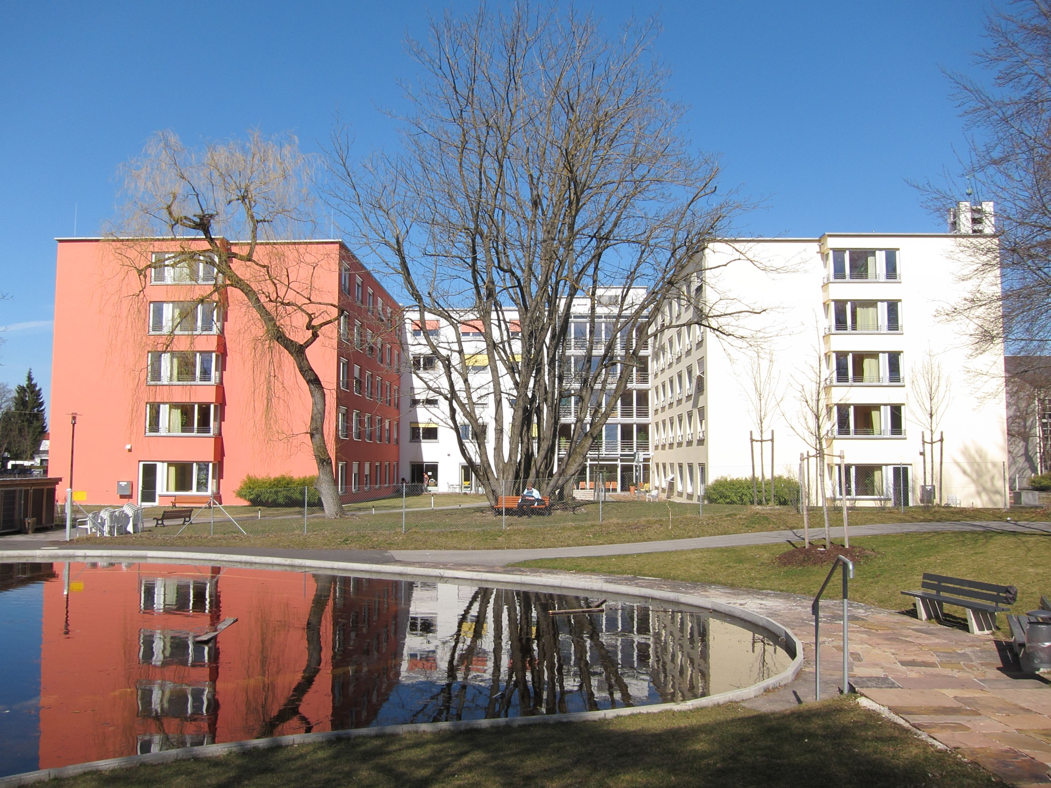 Agnes-Bernauer-Straße 185; Ehem. städtisches Altersheim München-West, jetzt Alfons-Hoffmann-Altenheim, großräumig und mehrflügelig angelegter, höhenmäßig gestaffelter Baukomplex, von der Straße platzartig zurückgesetzt und sich nach Süden einem großen Gartenareal öffnend, 1954–57 von Felix Büttner und Hans Högg; gestaffelt angeordneter Haupttrakt, geräumige Eingangshalle mit geschwungener Empore; westlich Wirtschaftshof; nach Süden einen Innenhof umschließende Wohntrakte, mit großem Gemeinschaftssaal; mit Ausstattung; Katholische Hauskapelle; mit Ausstattung; Garten, mit Freiplastiken.